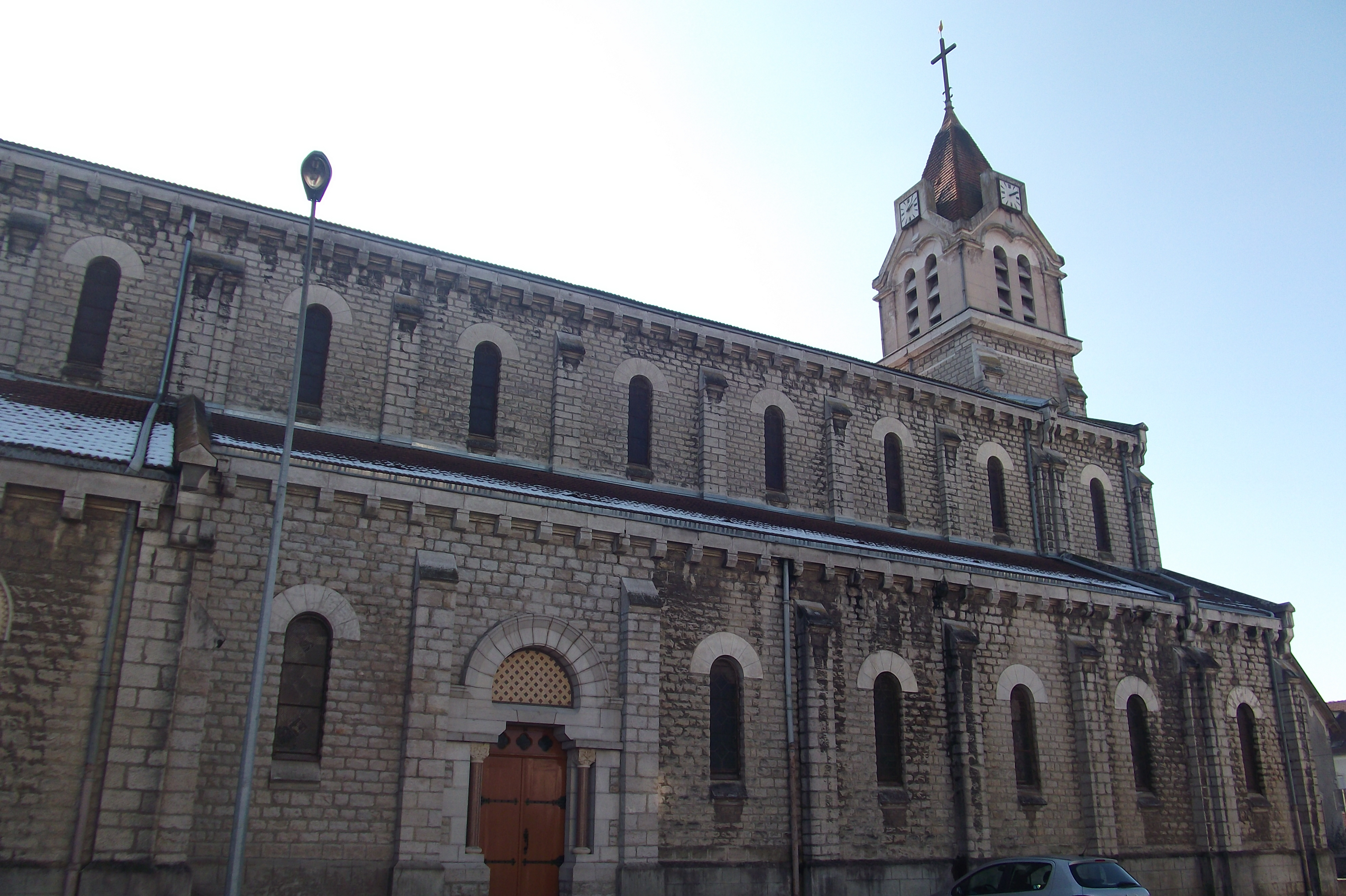 L'Église du Sacré-Cœur de Vesoul